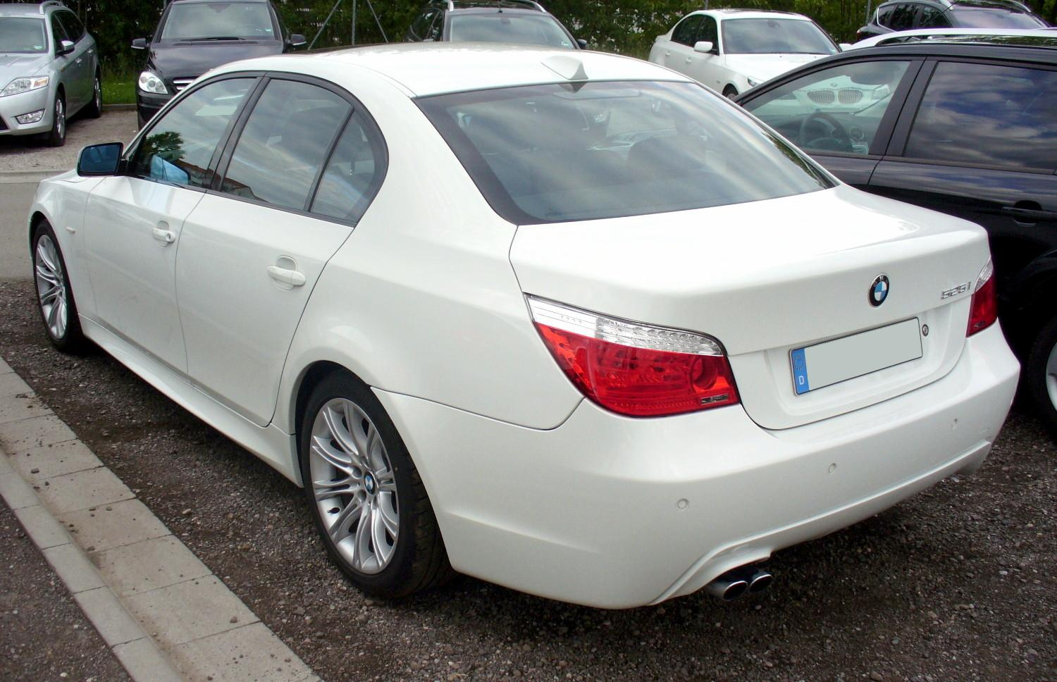 BMW E60 525i